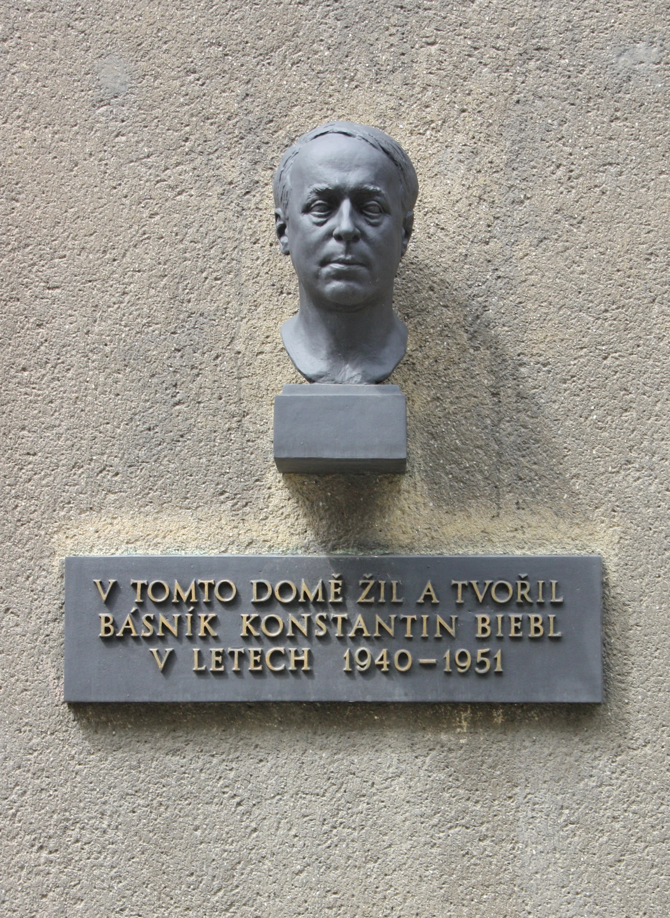 Pamětní deska básníka Konstantina Biebla na domě č.p. 401, Praha 2 - Nov Město, Na Výtoni 7